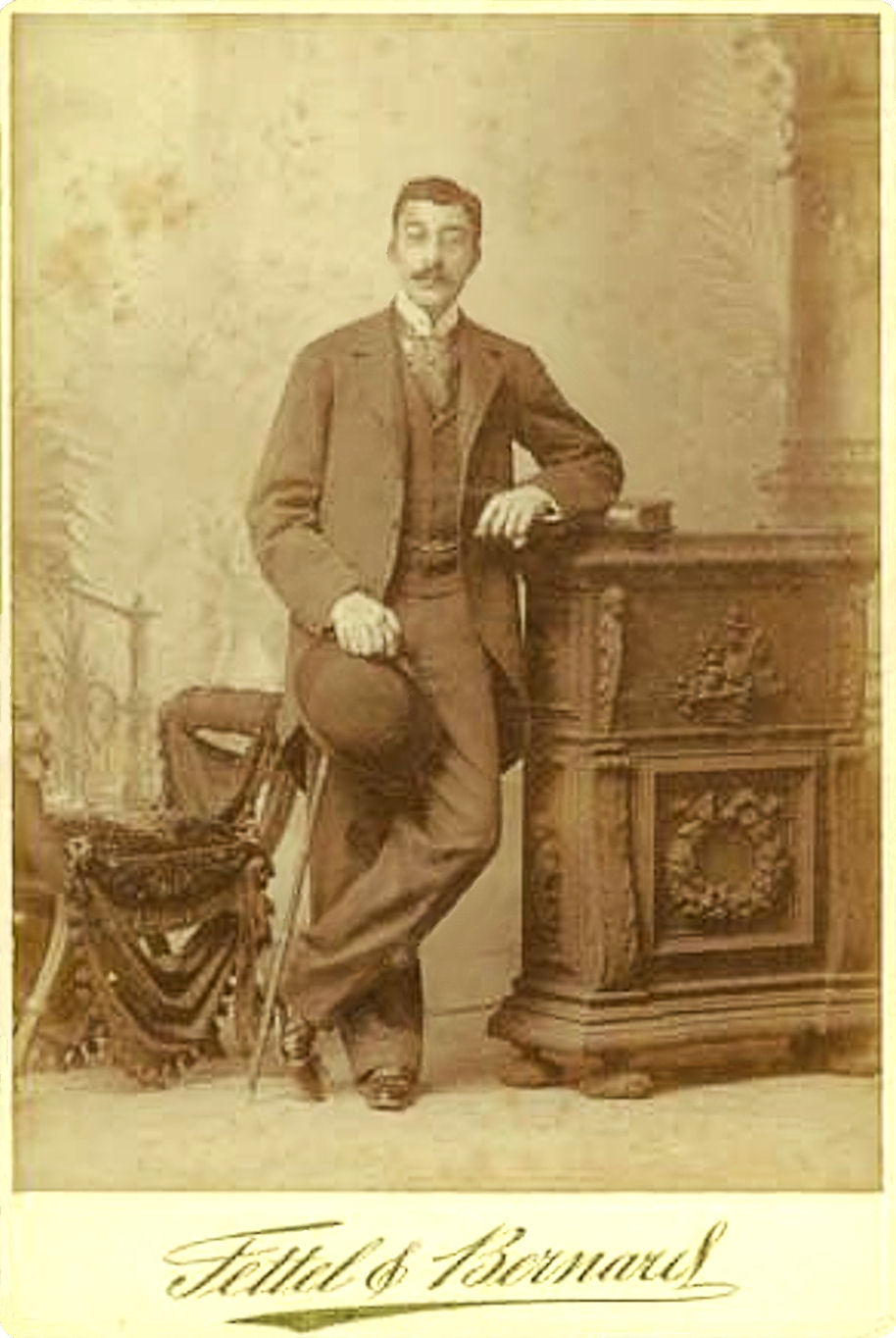 Ο Κωνσταντίνος Καβάφης με μπαστούνι και καπέλο στο χέρι. Φωτογραφία του 1896